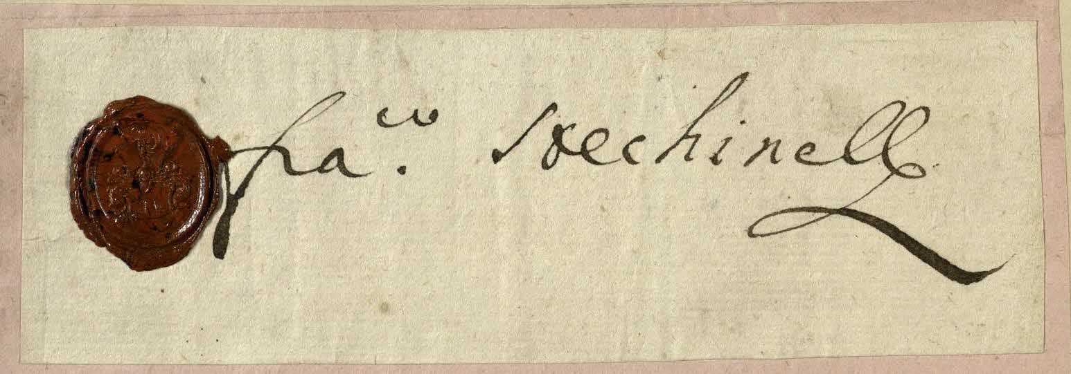 Braunschweig, Stechinelli: eigenhändige Unterschrift.